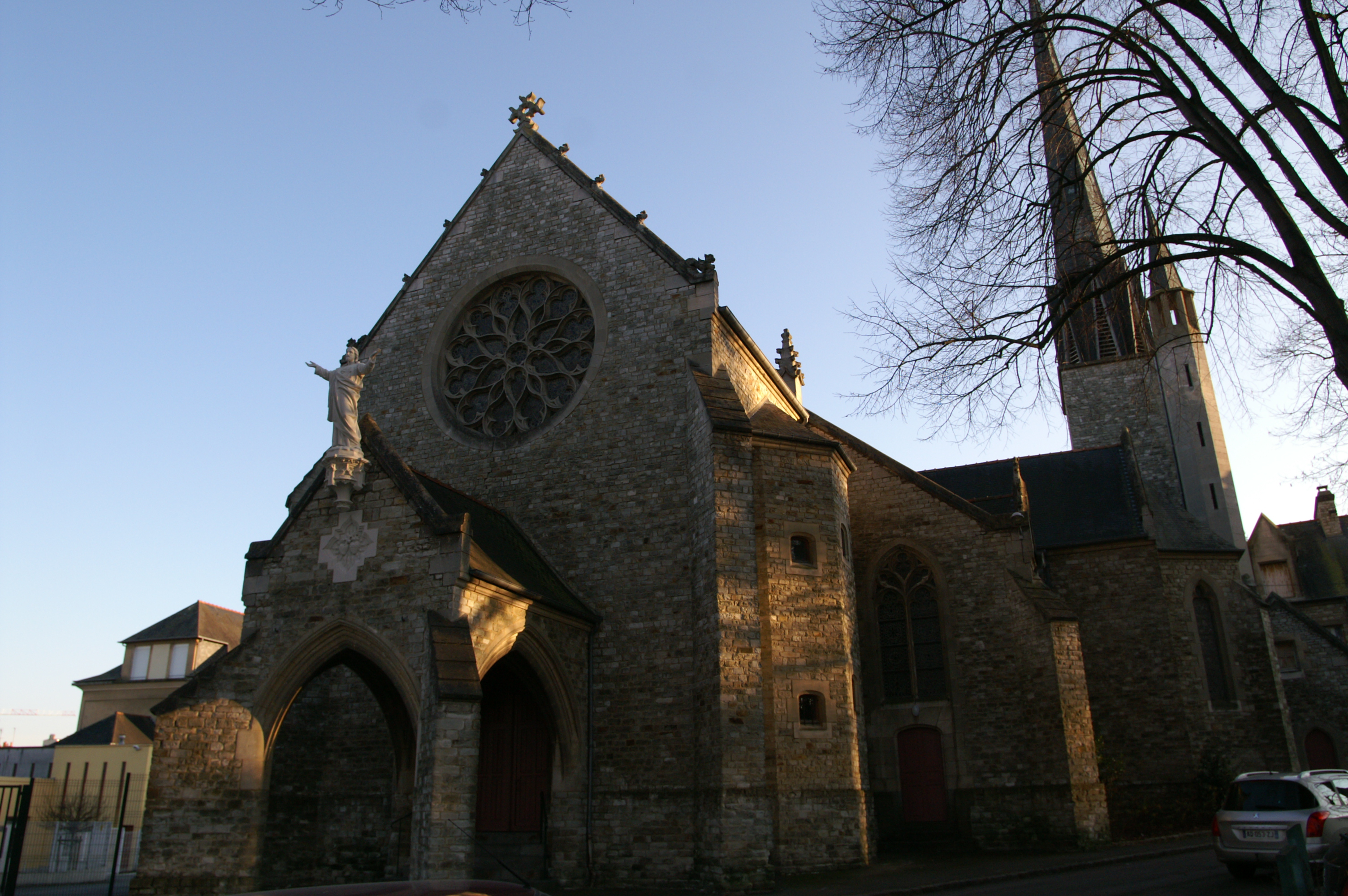 Église des Sacrés-Cœurs (de Jésus et de Marie) à Rennes, œuvre d’Arthur Regnault.